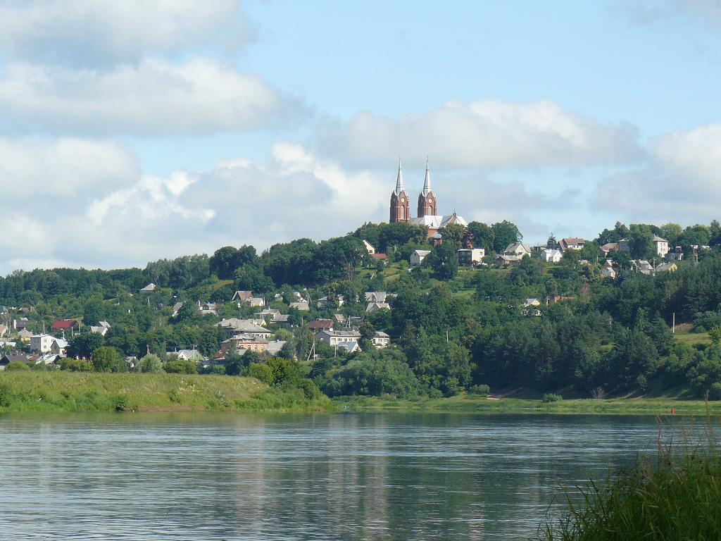 Miestelis prie Nemuno